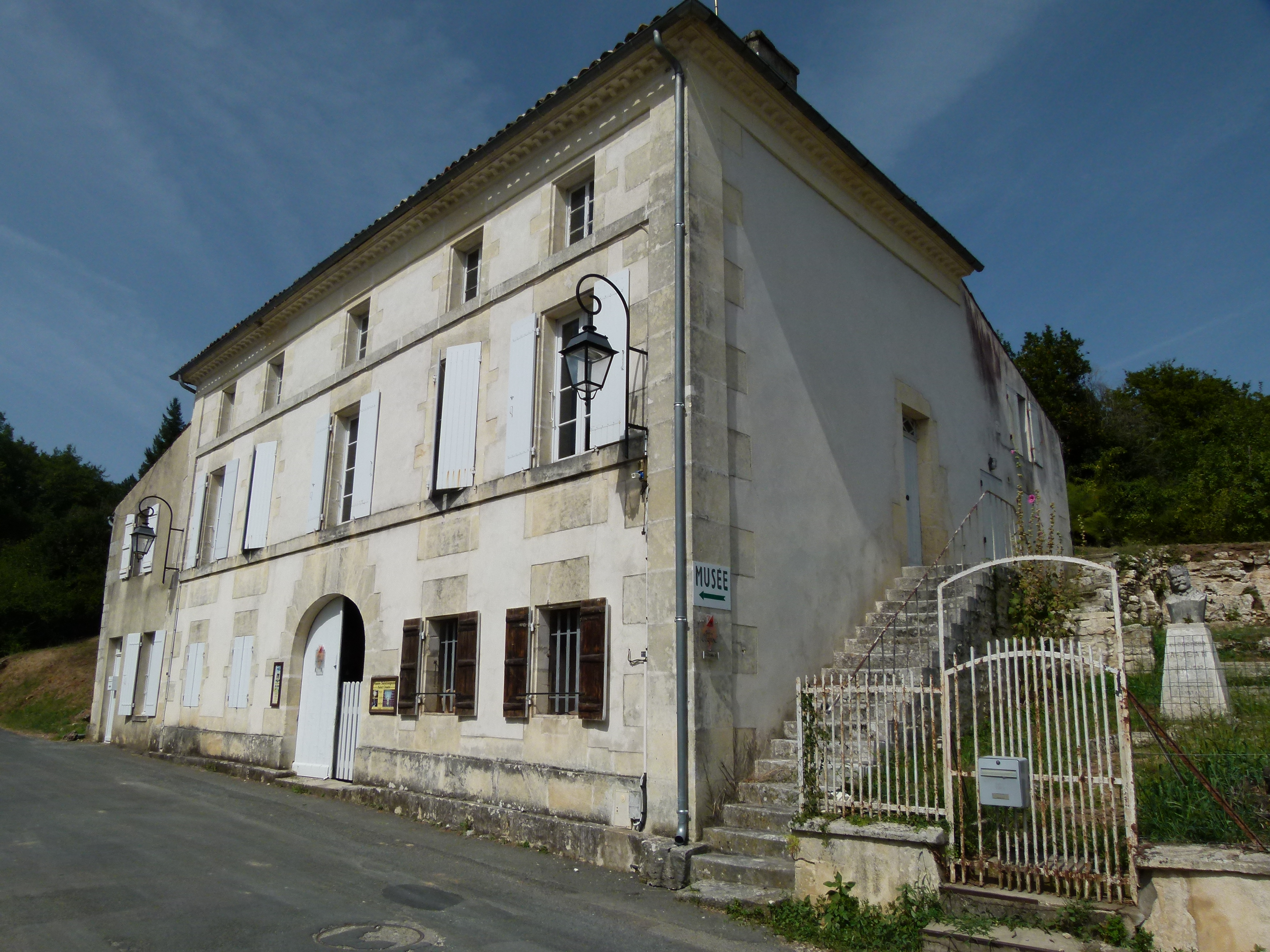 Le Musée des Bujoliers, anciennement dénommé la Mérine à Nastasie, est un musée rural et ethnographique situé dans le hameau des Bujoliers, dans la commune de Saint-Césaire en Charente-Maritime, près de Saintes.